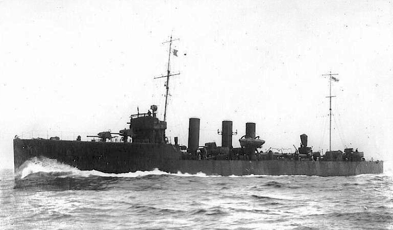 Der britische Zerstörer HMS TURBULENT